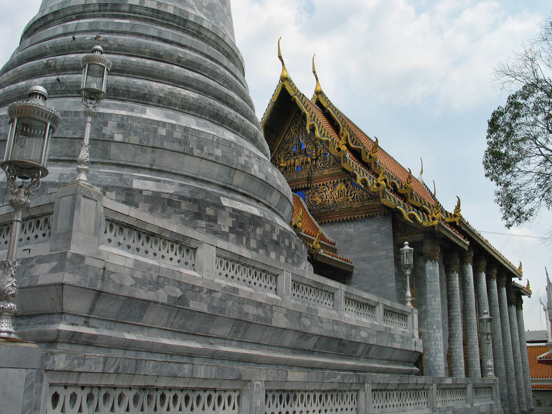 Wat Rajapradit (วัดราชประดิษฐ์สถิตมหาสีมารามราชวรวิหาร), Bangkok, June 2005